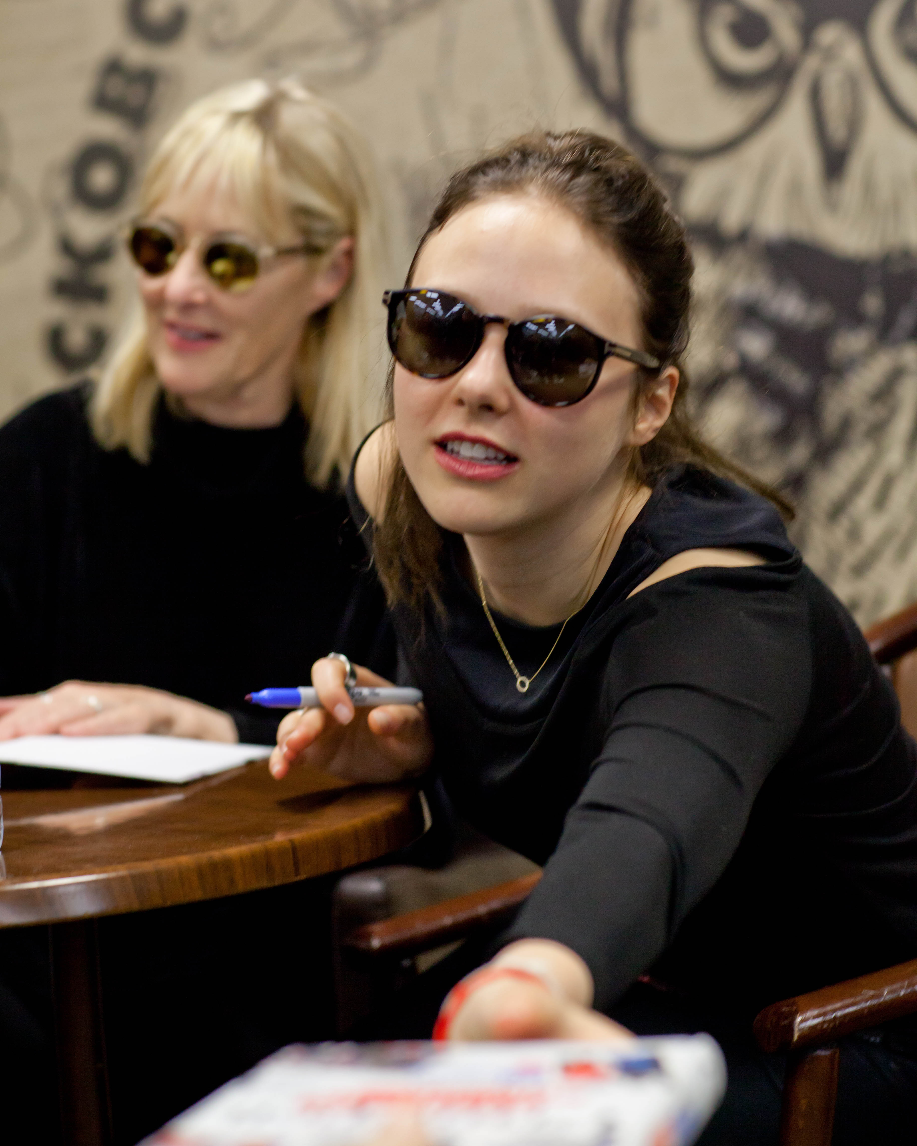 Джоанна и Мэдисон Стингрей на презентации книги "Стингрей в стране чудес" в Московском доме книги на Новом Арбате